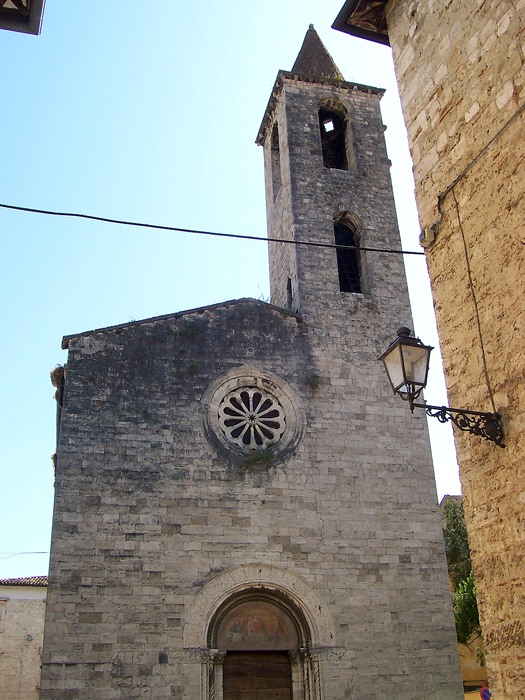 Ascoli Piceno - Chiesa di S. Giacomo